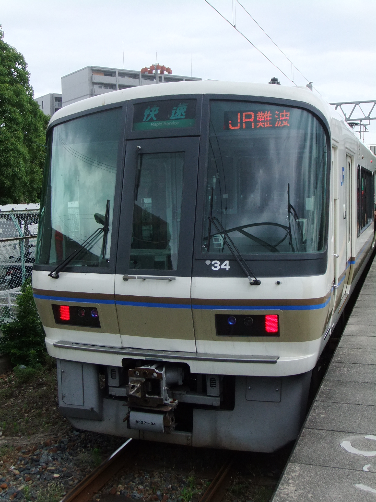 JR西日本 221系体質改善工事車 前面